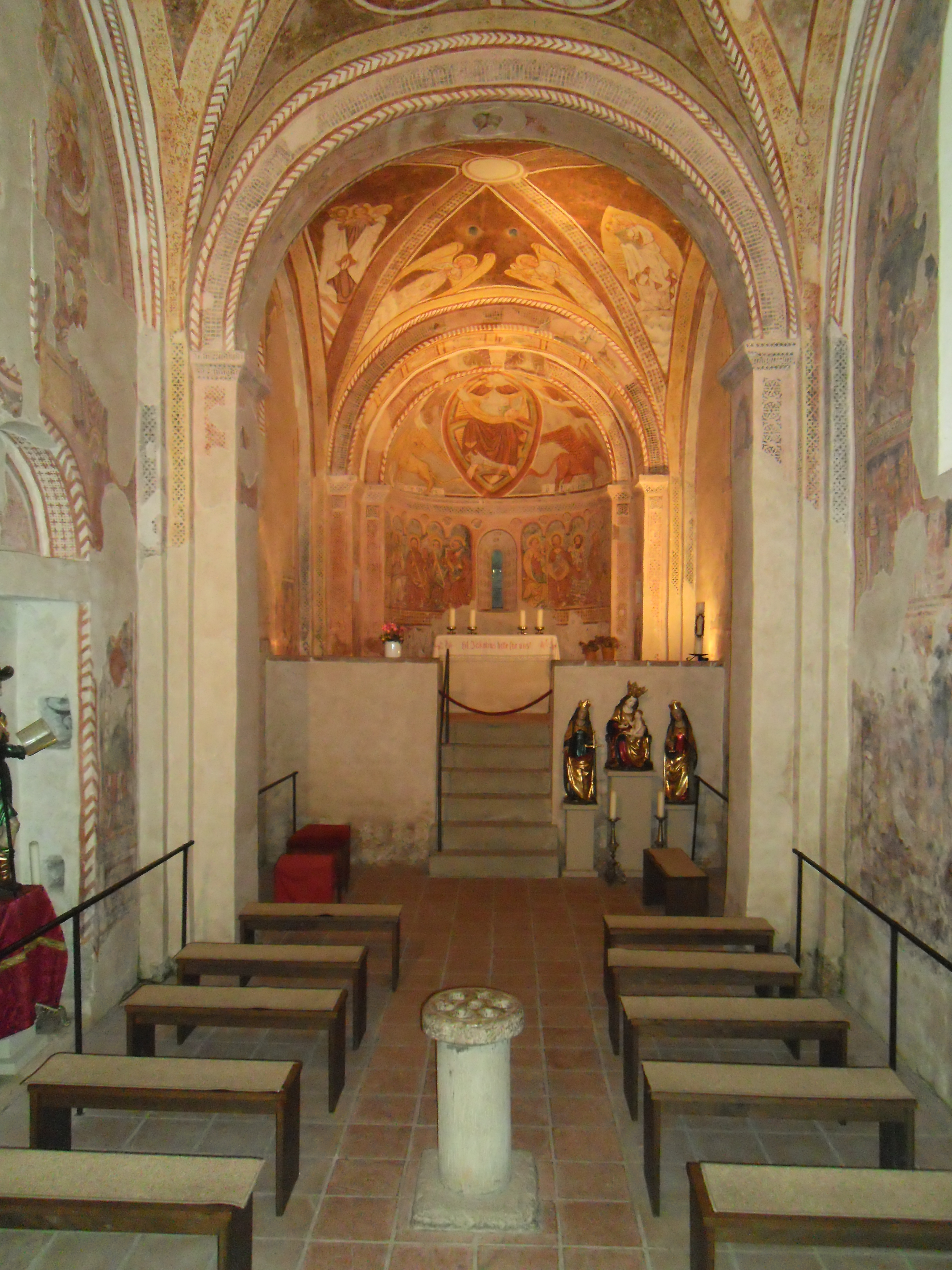 Gemeinde Prien am Chiemsee, Blick auf den Chor. Links oben am Chorgewölbe befindet sich das sogenannte Dreifaltigkeitsfresko, das in der Kunstgeschichte einiges Aufsehen erregt hat.